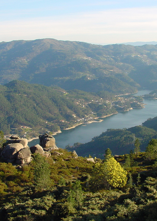 Panorâmica da Albufeira da Caniçada – Vila do Gerês – Terras de Bouro